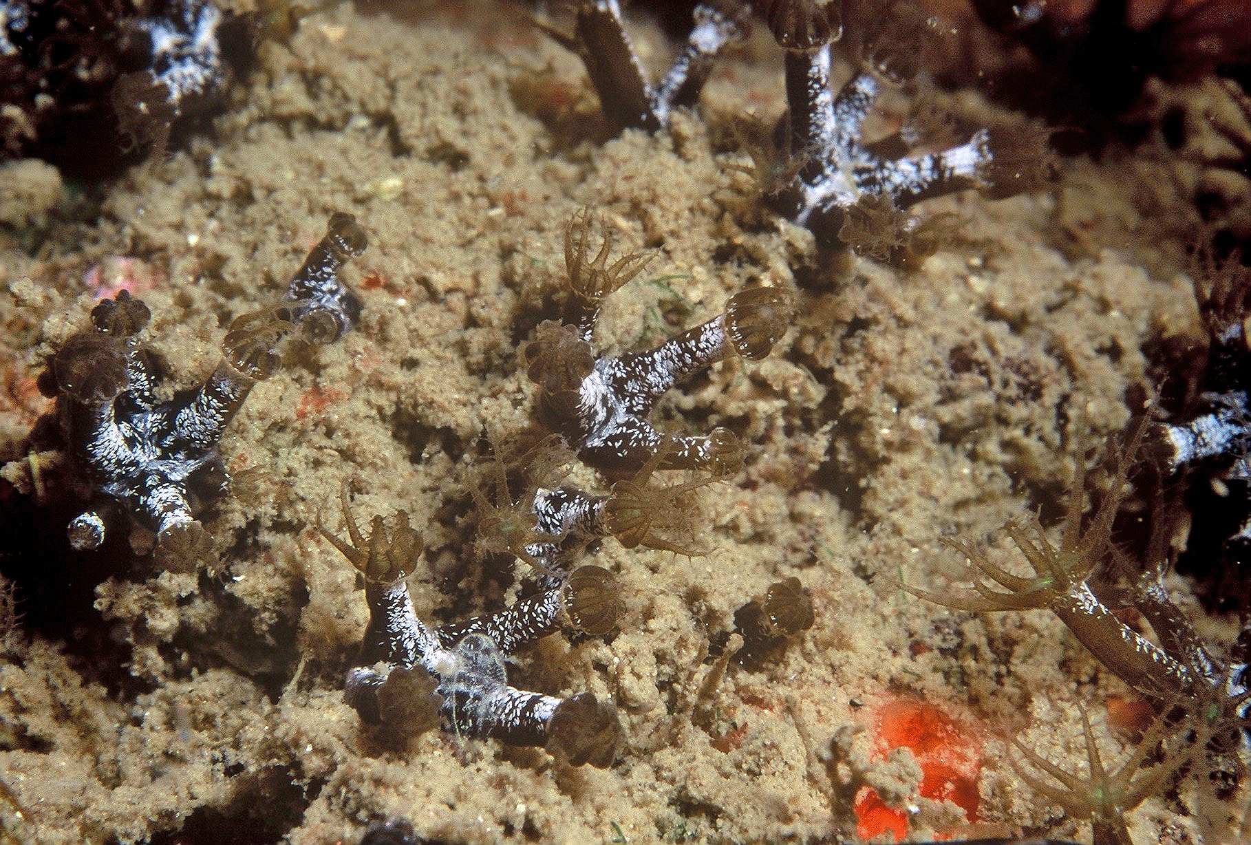 colonies de Maasella edwardsi. Le corps brun-vert, la bouche vert-émeraude et les spicules blancs, qui servent d'armature, sont les critères de reconnaissante de cet octocoralliaire